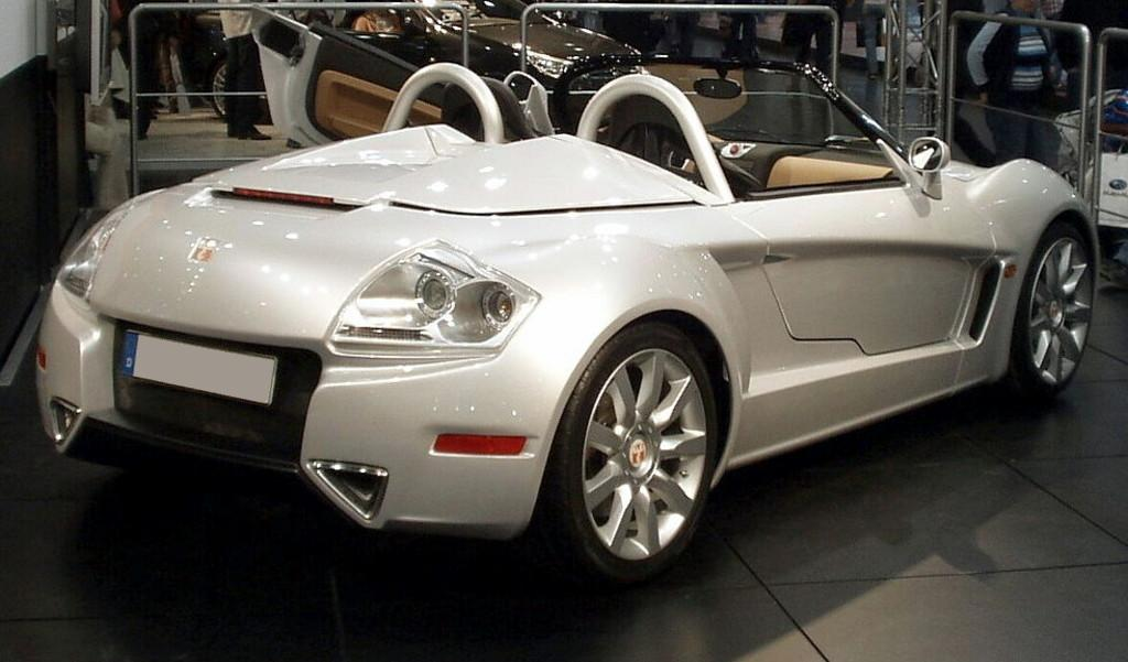 YES! Roadster